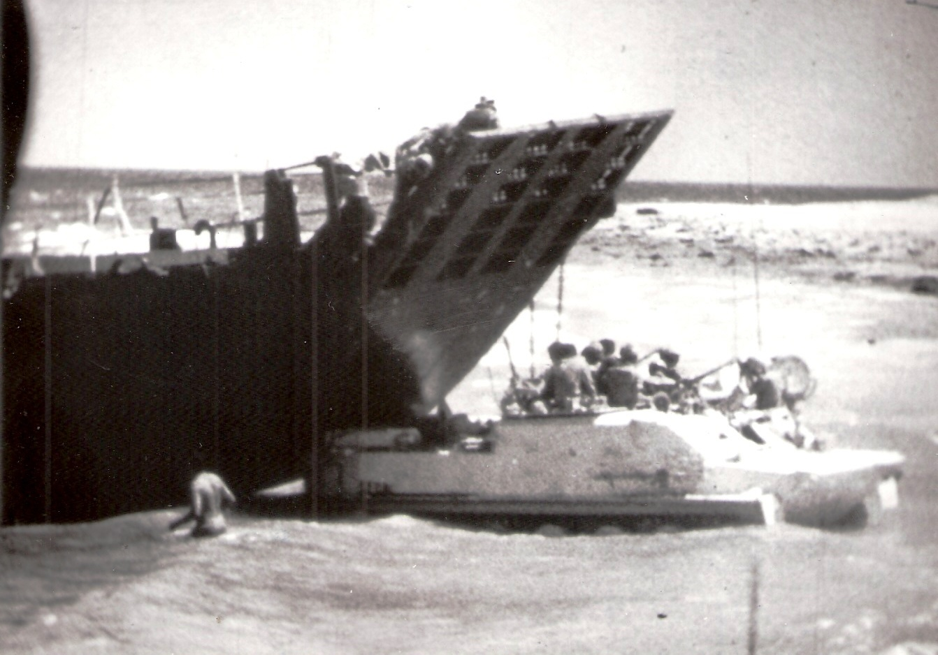 נגמ"ש דוחף נחתת שנתקעה על החוף במפרץ סואץ בעת הפינוי במבצע רביב, 9 בספטמבר 1969